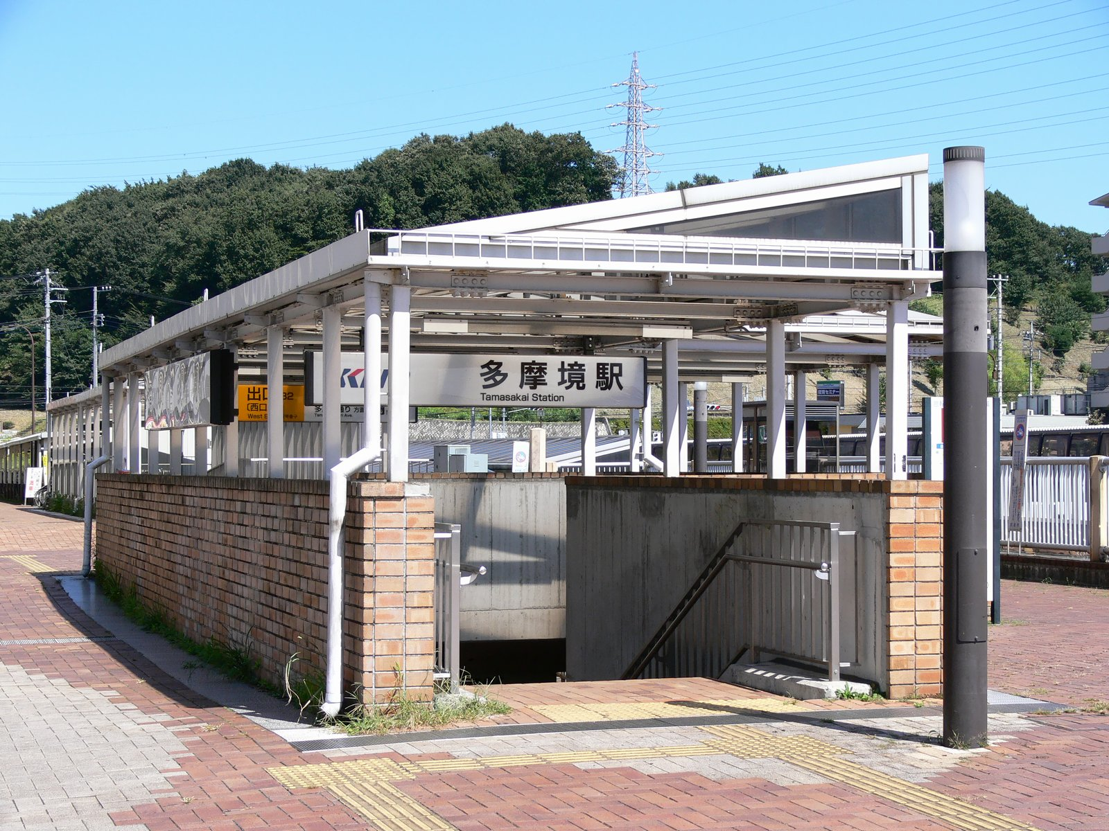 Keio railway Tamasakai station.多摩境駅